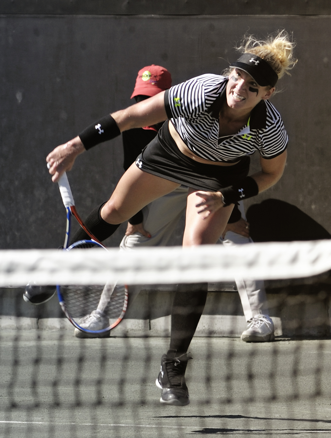 Emiliàn e rumagnòl: La Bethanie Mattek-Sands tòlta zò durànt al turnèo ad Charleston dal 2011